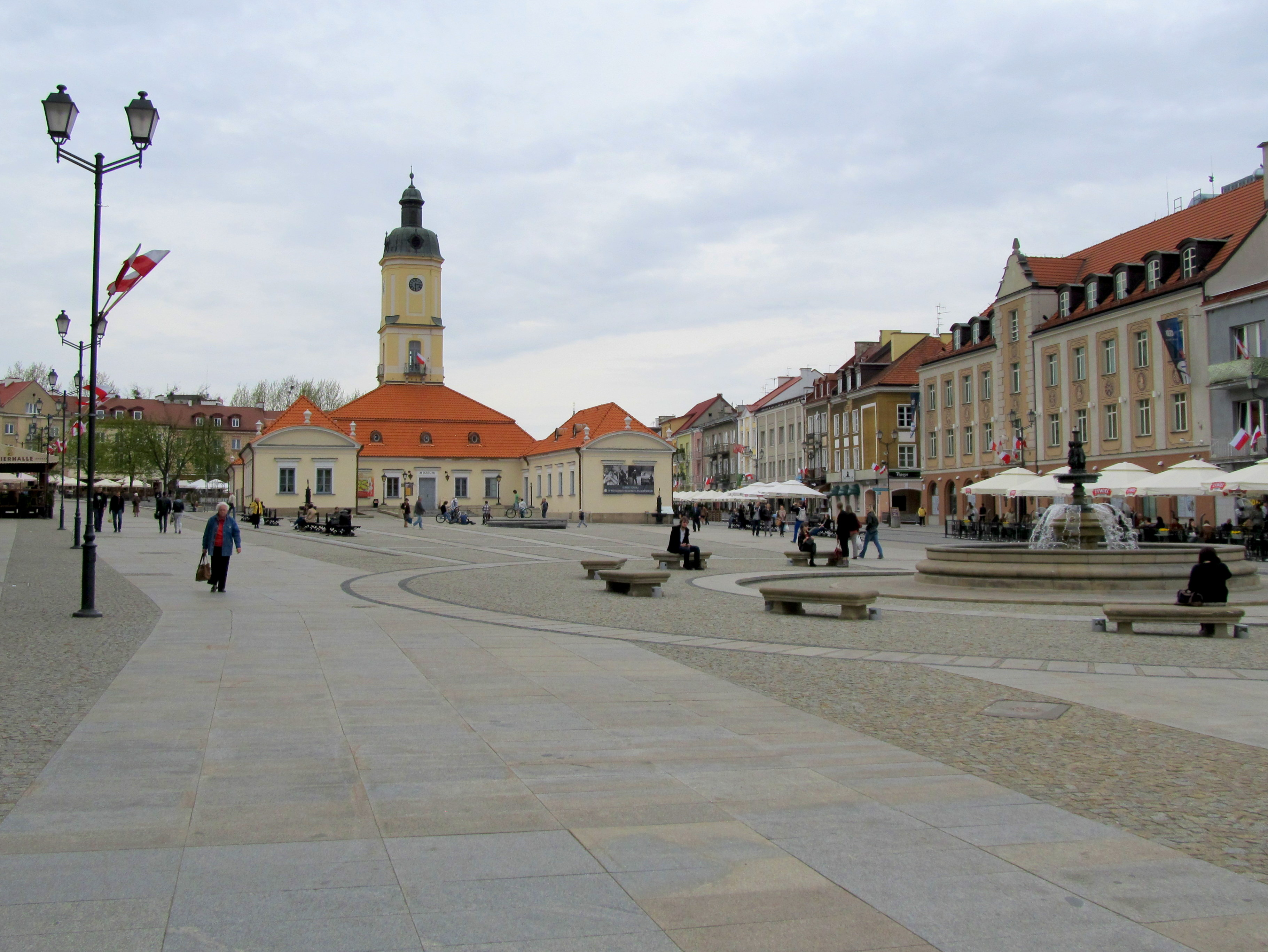 Białystok, ratusz, ob. muzeum, 1745-1761